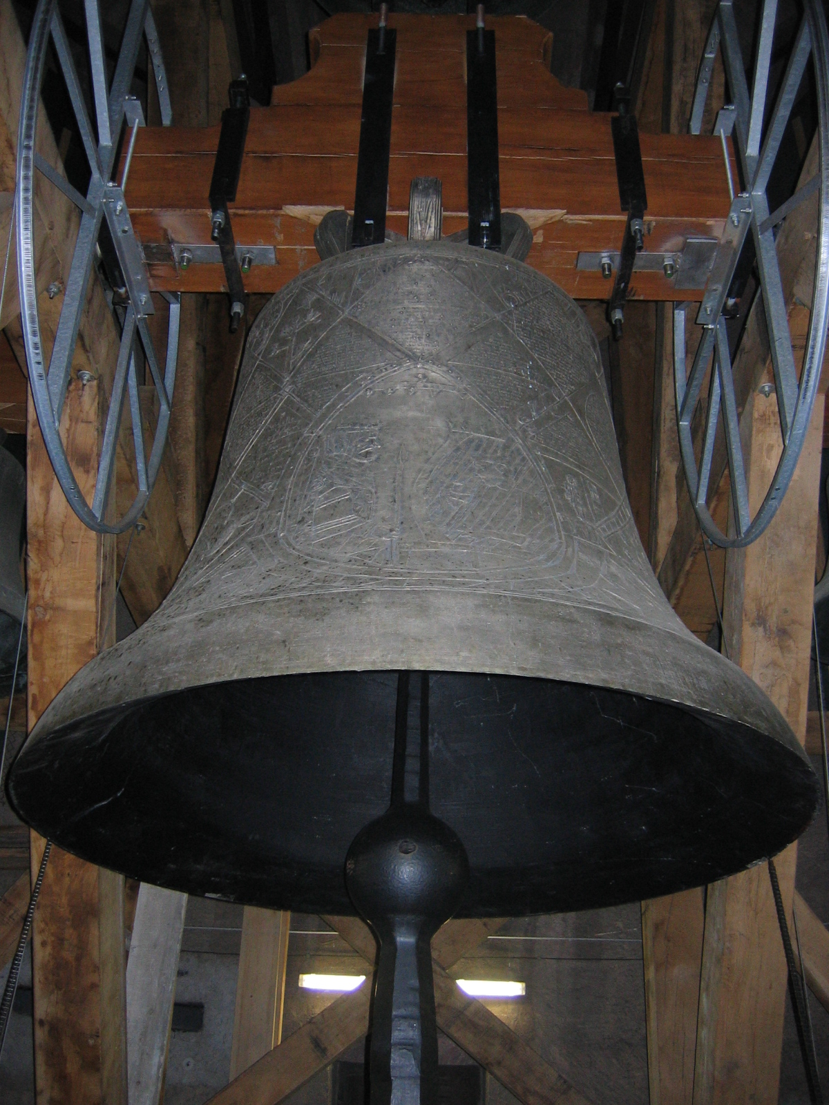 Große Friedensglocke (2004) der Christuskirche zu Karlsruhe.